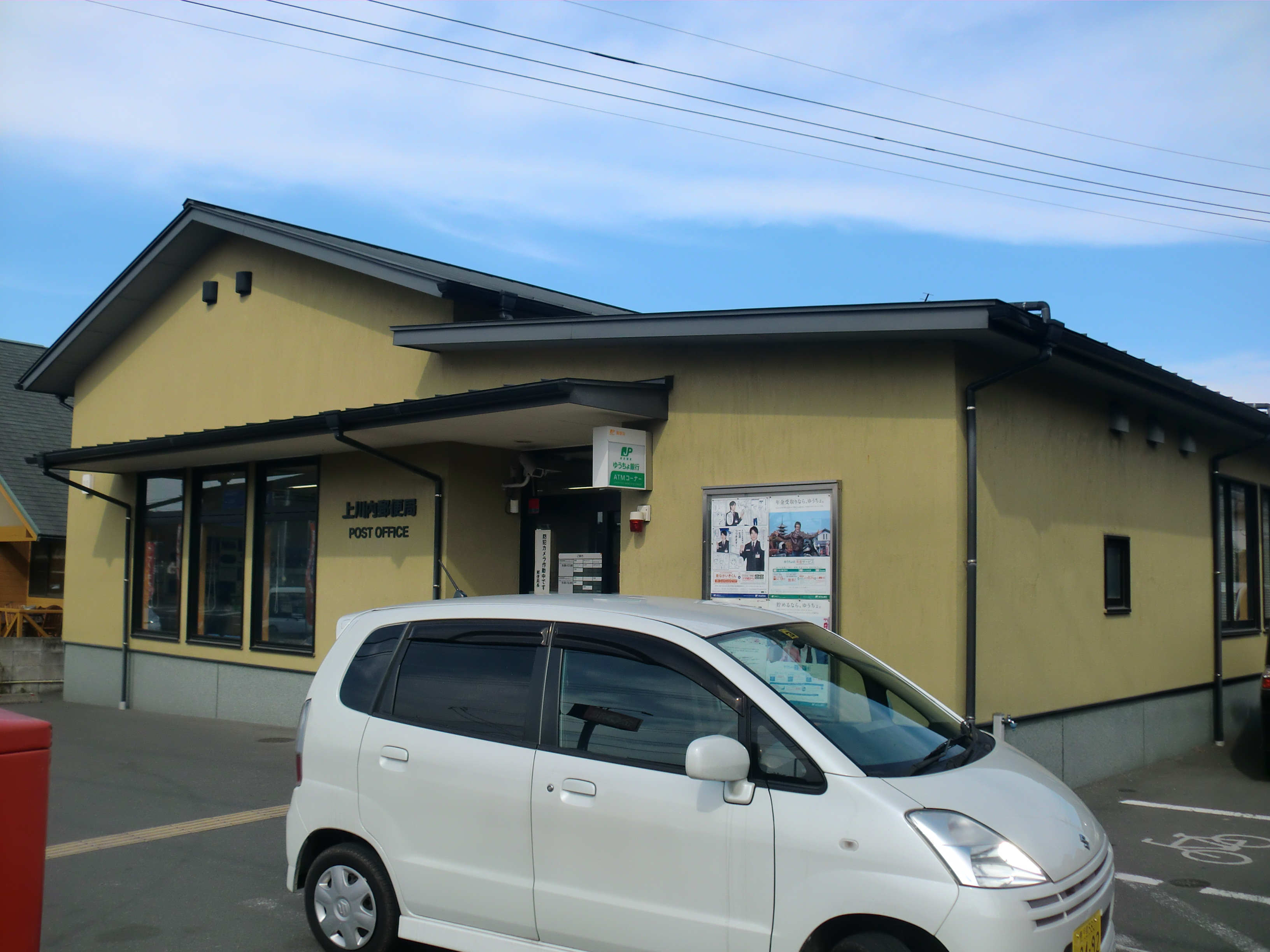 薩摩川内市にある上川内（かみせんだい）郵便局